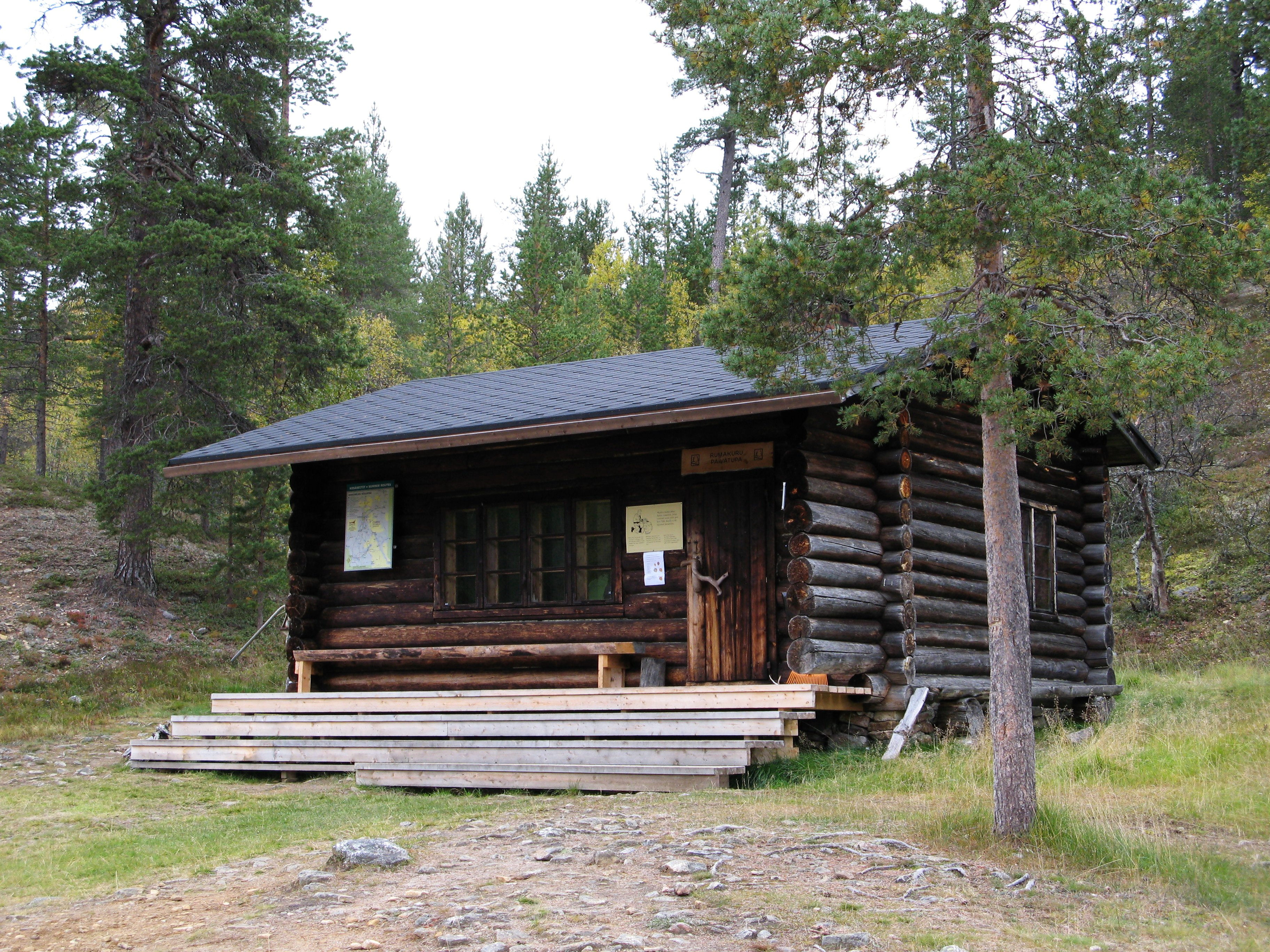 Rumakurun päivätupa Saariselällä